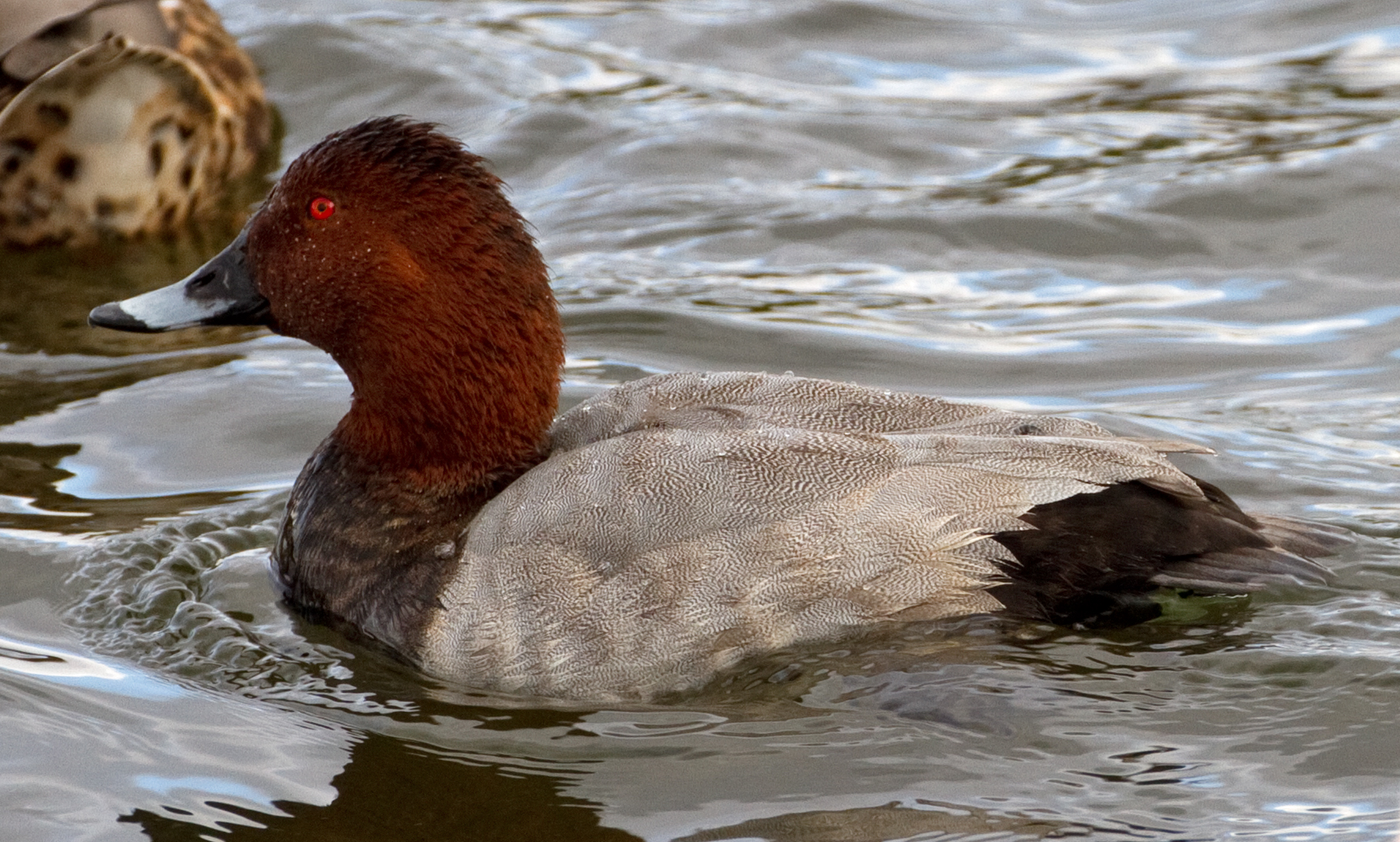 Pochard 1z